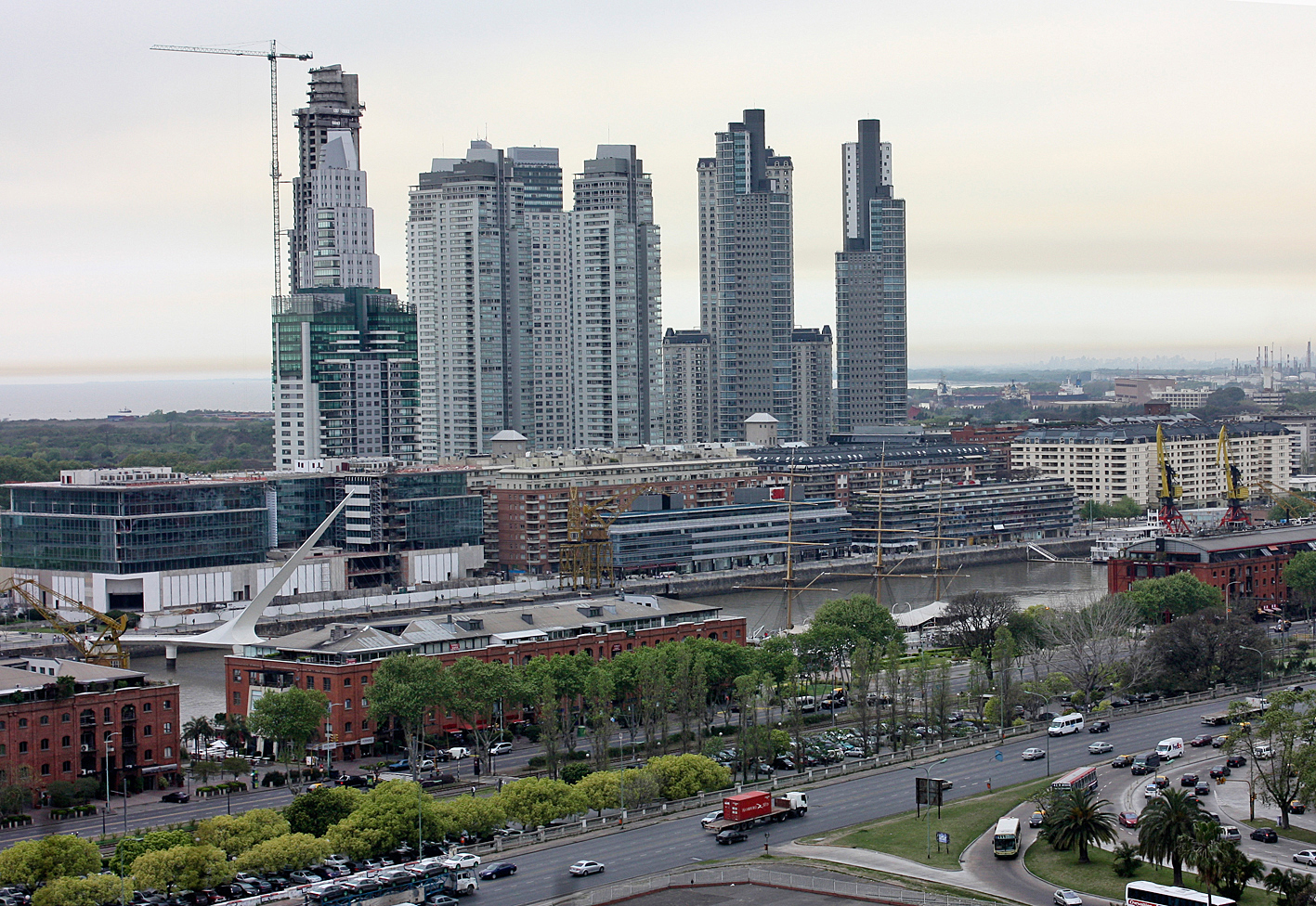 Puerto Madero, Buenos AIres, desde el 8vo piso del Archivo General de la Nación